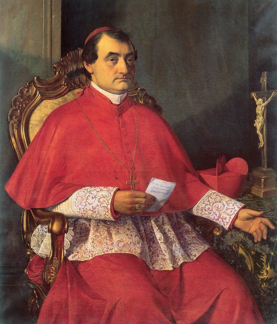 il cardinale Fabio Maria Asquini, olio su tela di Giuseppe Malignani, 1855 (Fagagna, chiesa di S. Giacomo).